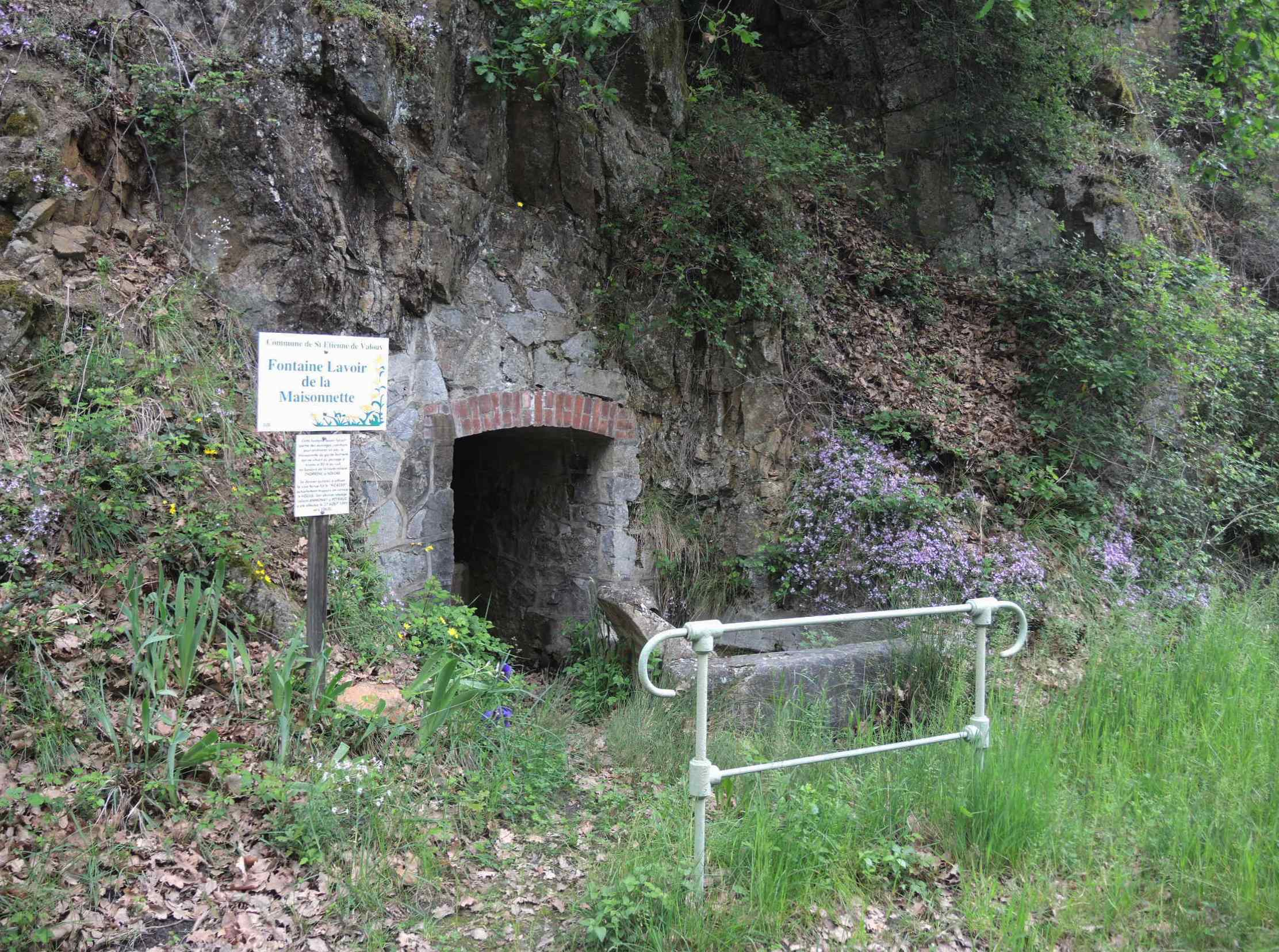 Saint-Etienne-de-Valoux détail